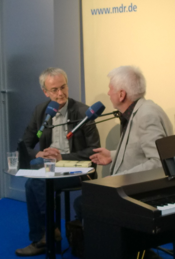 Jens Sparschuh (links) im Gespräch mit Michael Hametner auf der Buchmesse Leipzig 2012